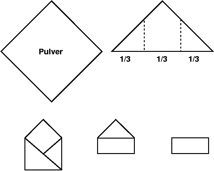 So wird ein szenetypisches Päckchen gefaltet